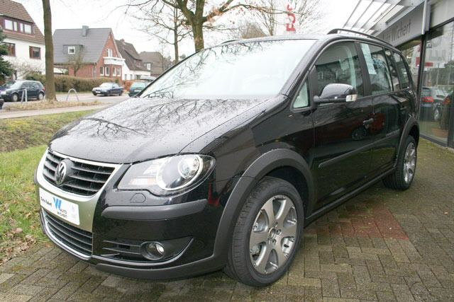 Volkswagen CrossTouran